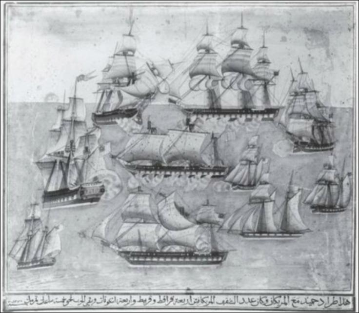 Le navire amiral algérien Meshuda dans la bataille du cap Gata (1815) face à une escadre américaine.